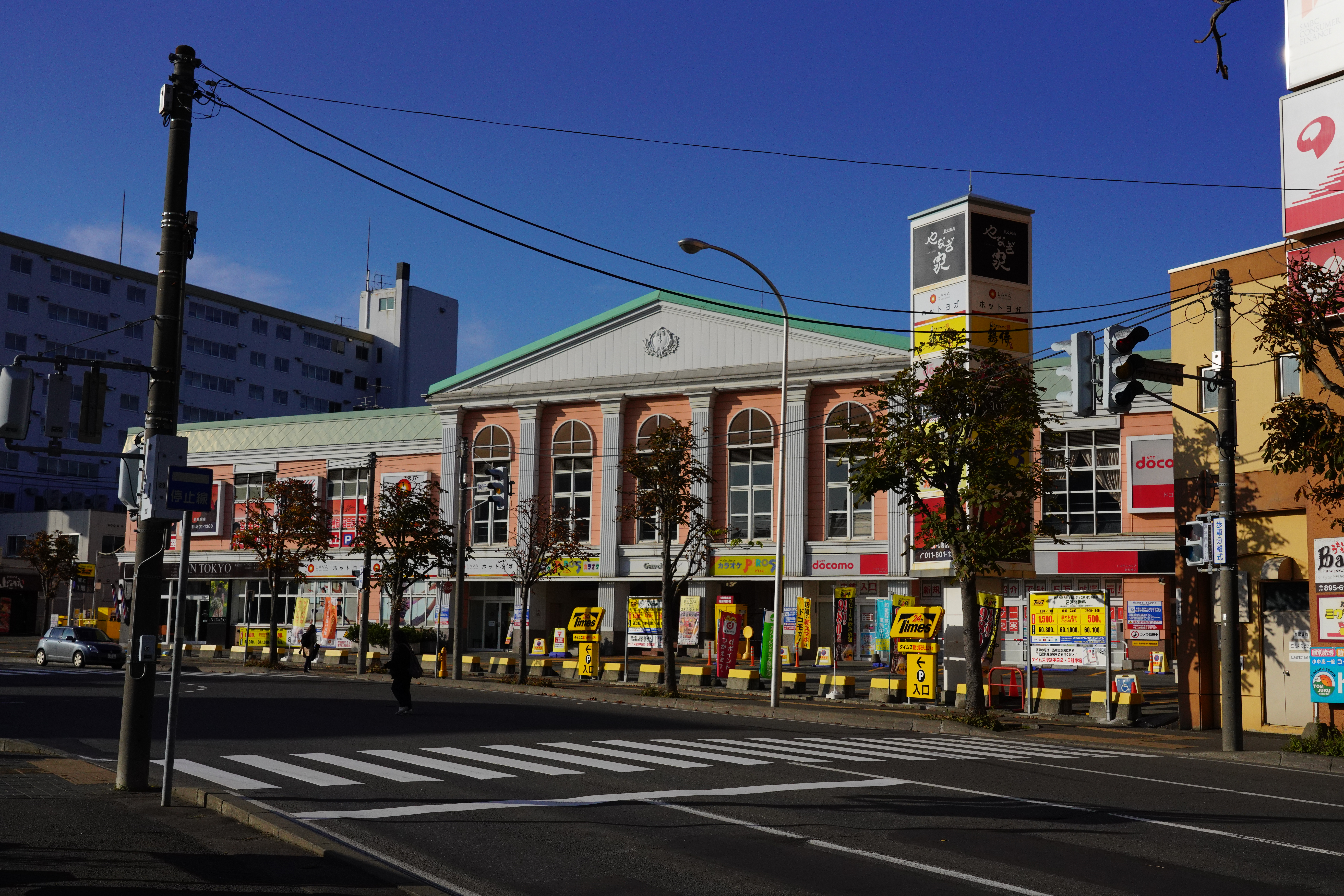 20181108_Atsubetsu_6545